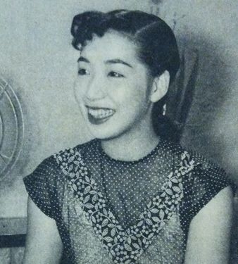 長谷川季子